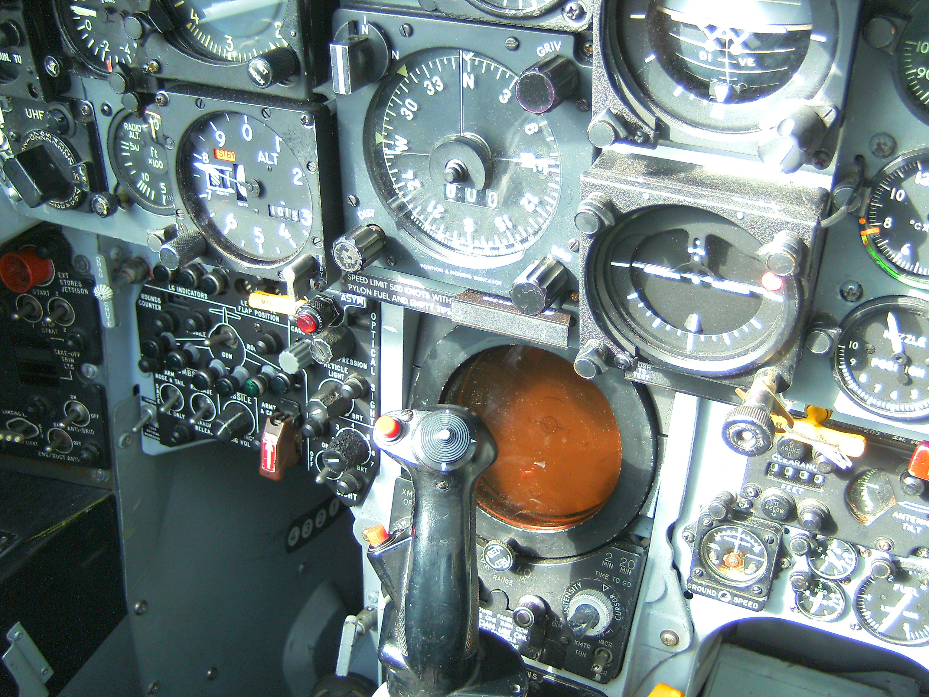 Tag der offenen Tür Allgäu Airport 2008 F 104 Cockpit